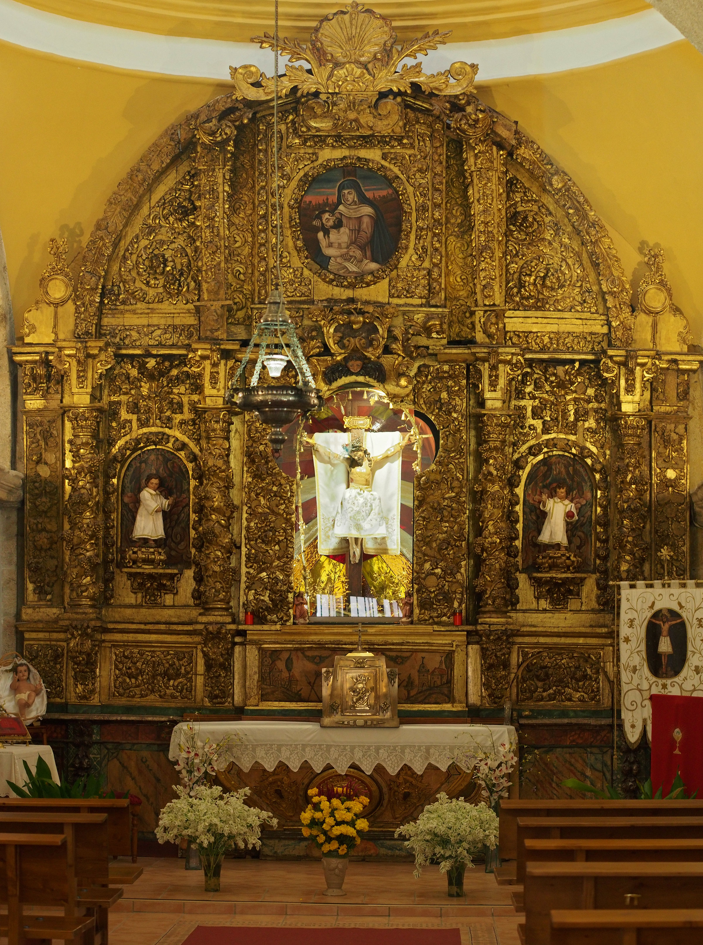 Retablo churrigueresco de la ermita del Cristo de la Misericordia. Losar de la Vera (Cáceres, España).